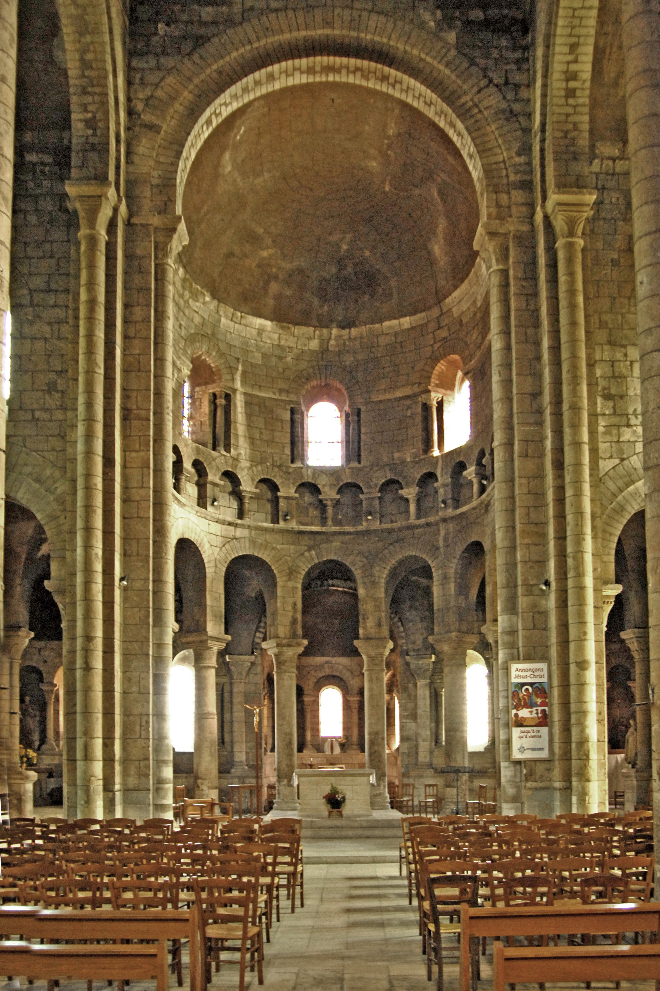 St.-Etienne Nevers, Chor aus Mittelschiff